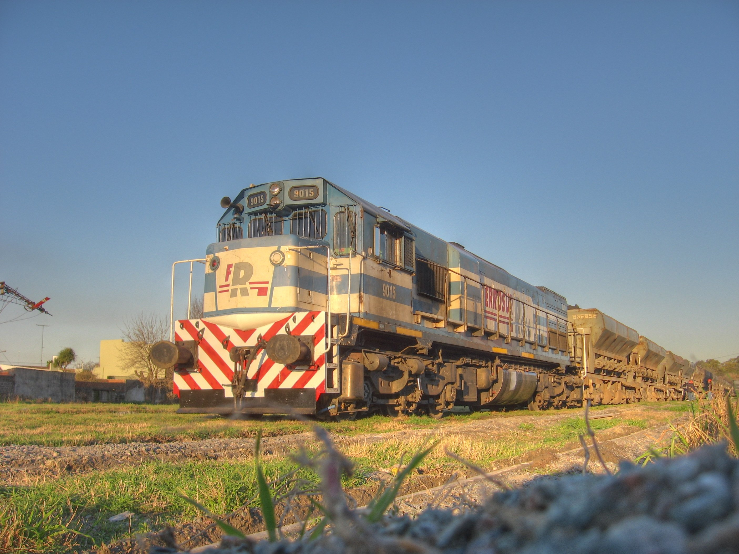 Locomotora 9015 General Motors GT-22CW de Ferrosur Roca con tolvas para el transporte de carbón vacías.